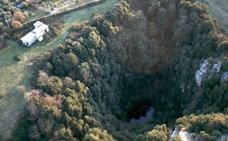 pozzo del merro